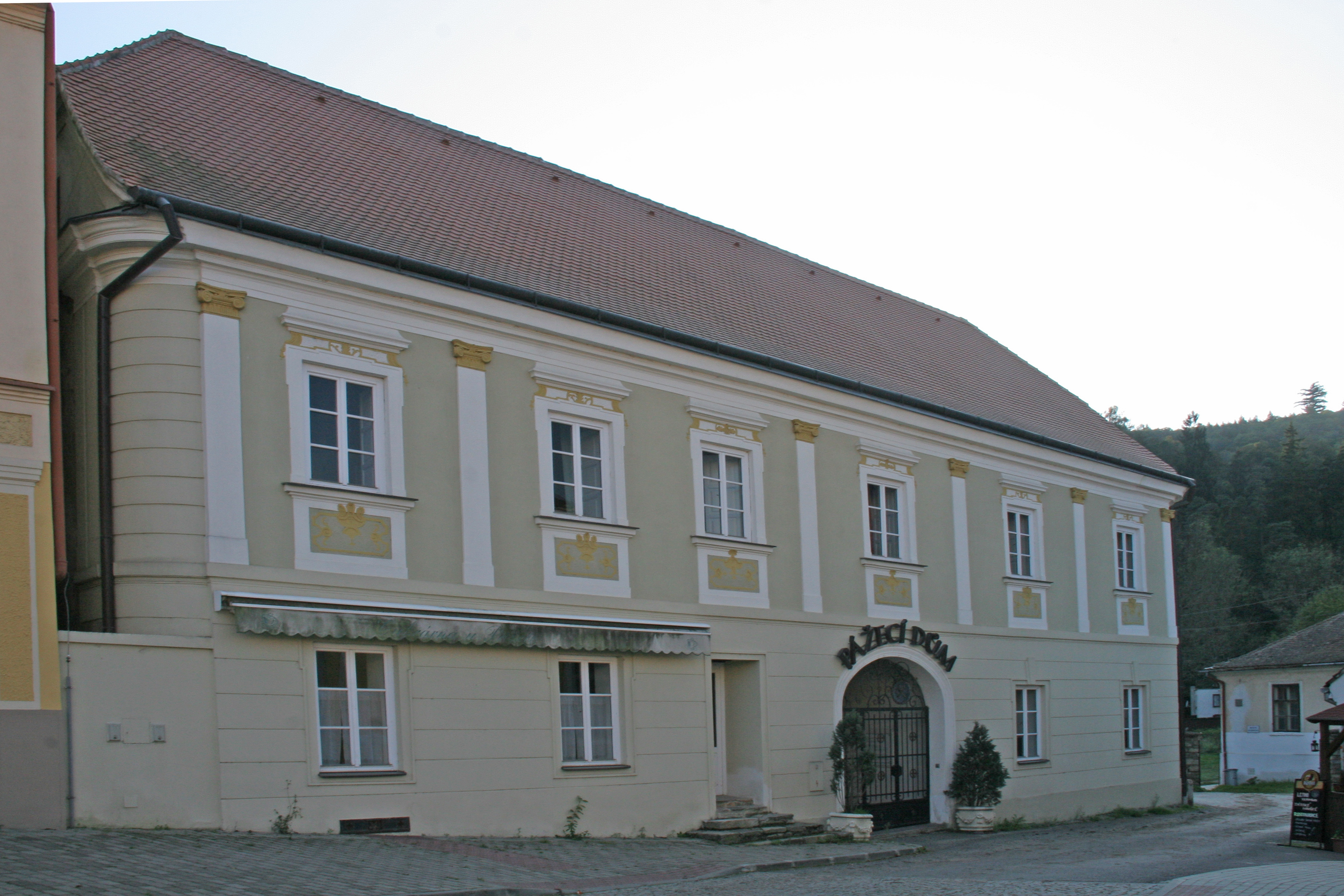 Dům čp. 44, Vranov nad Dyjí 44, náměstí, Vranov nad Dyjí.